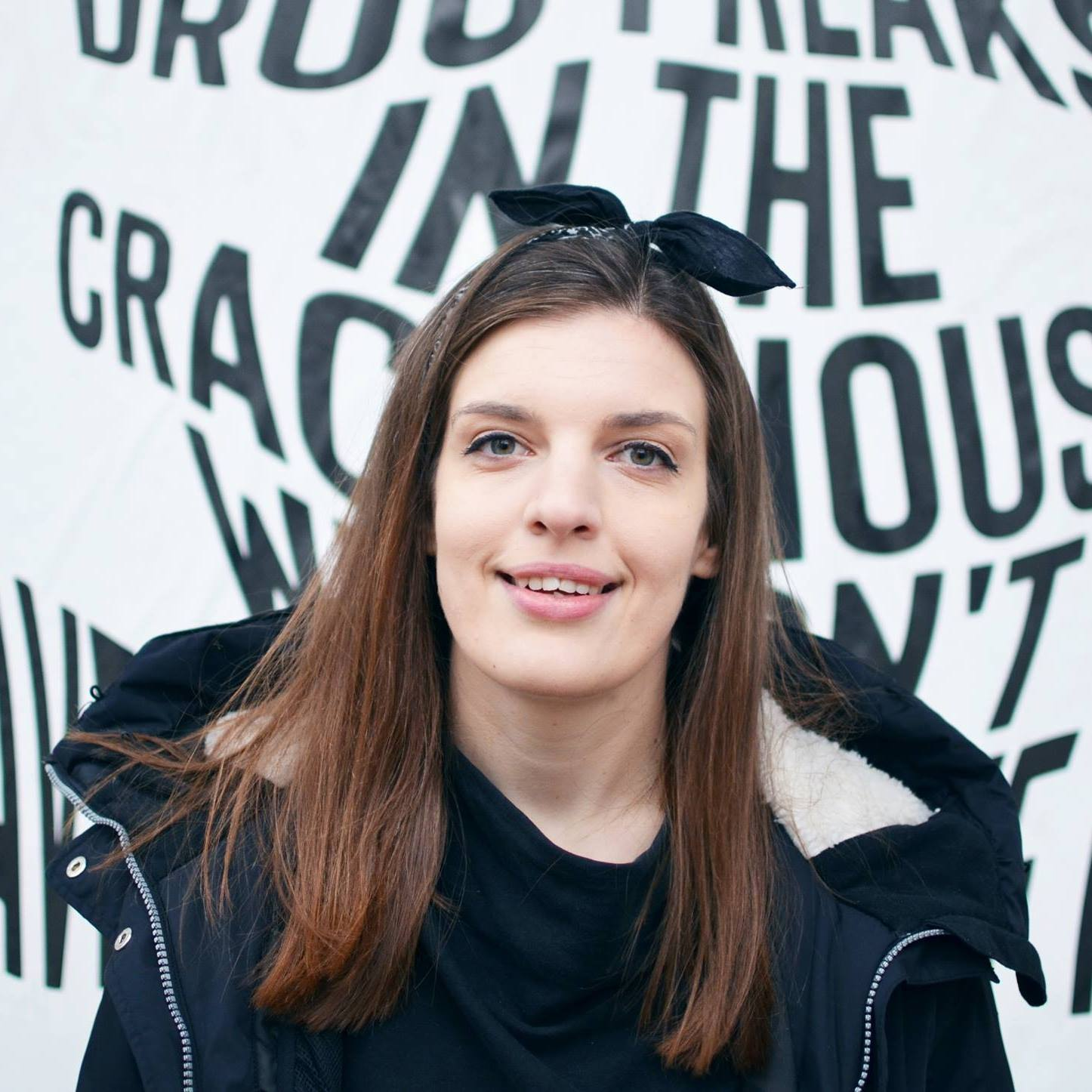 Kotryna Zylė (Zilinskienė)